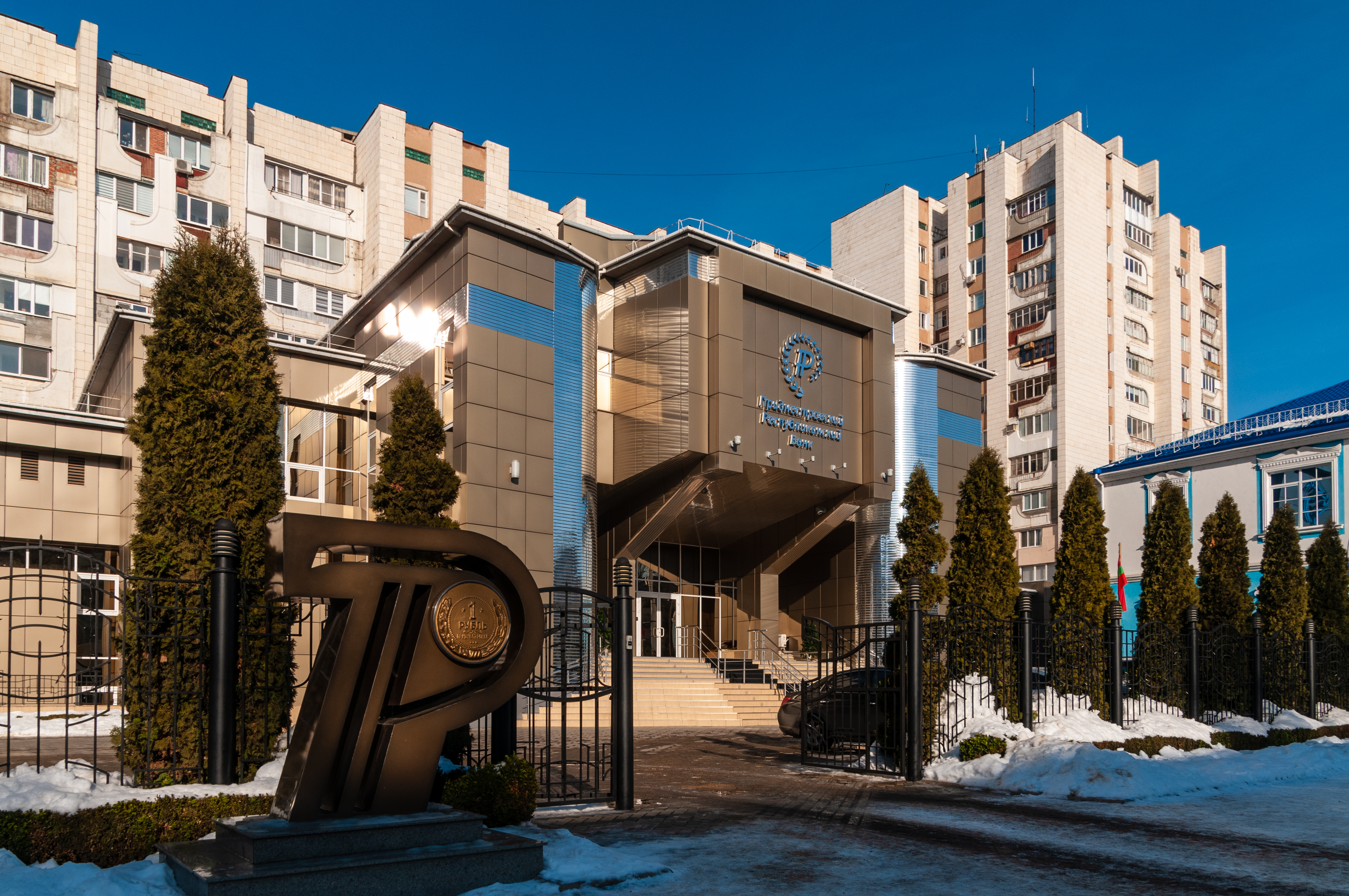 Tiraspol, Pridnestrowien, Nationalbank